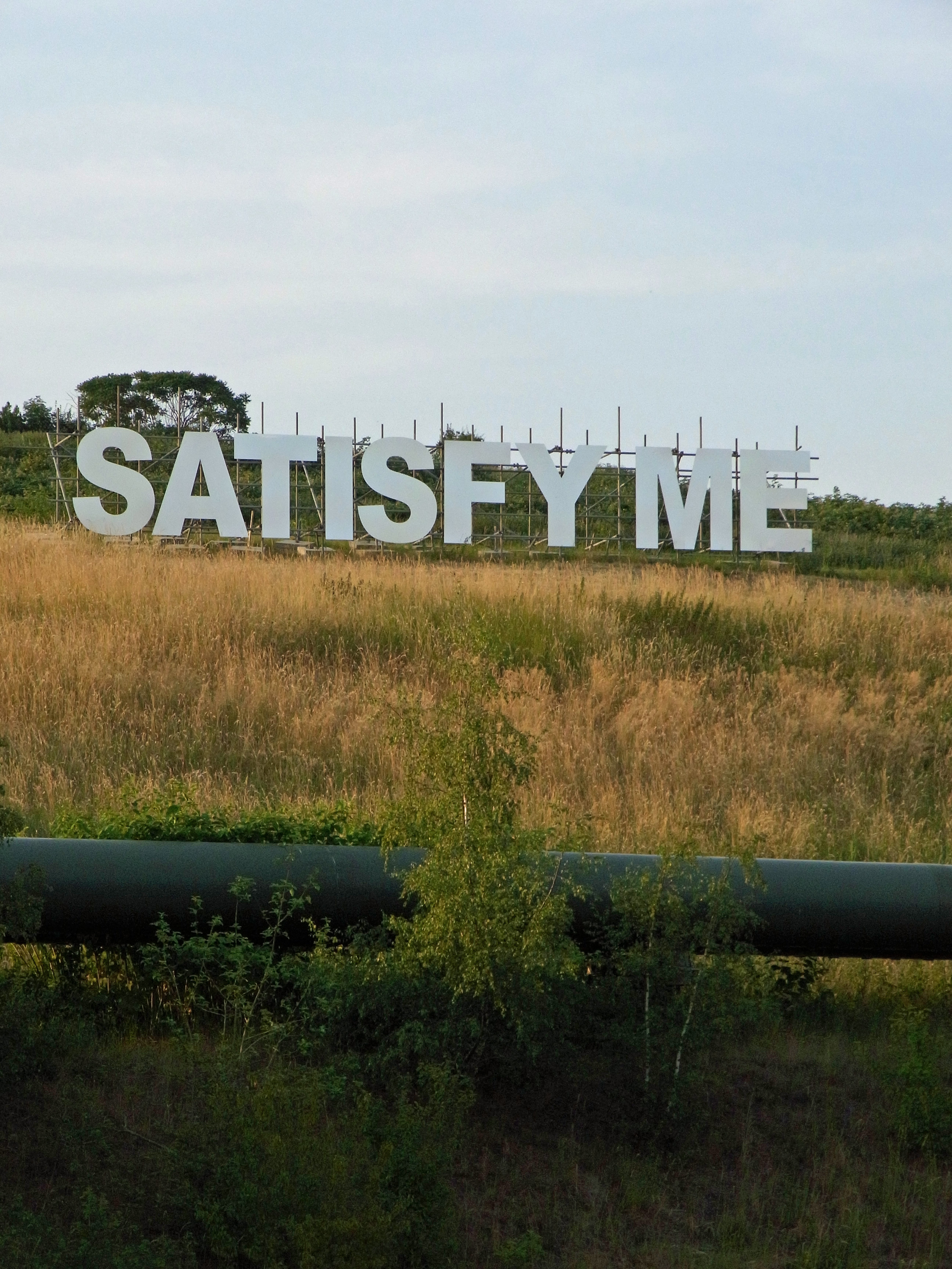 Emscherkunst.2010 Monica Bonvicini: Satisfy Me